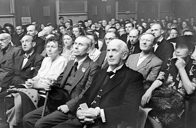 Original image description from the Deutsche Fotothek Porträts: Prof. [Max ?] Pechstein, [Johannes?] Stroux, Kraus, Benedik, Lederer, Theodor Plivier, Prof. Victor Klemperer und Klaus Gysi